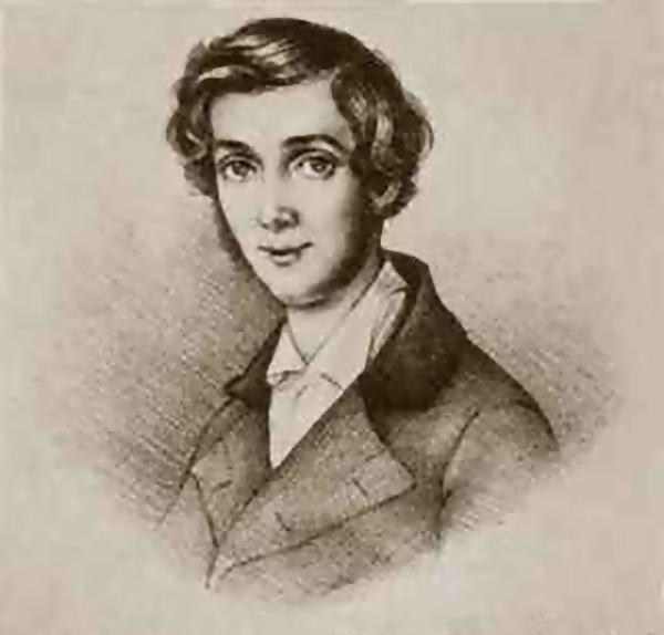 Theodor Fontane im Alter von 23 Jahren